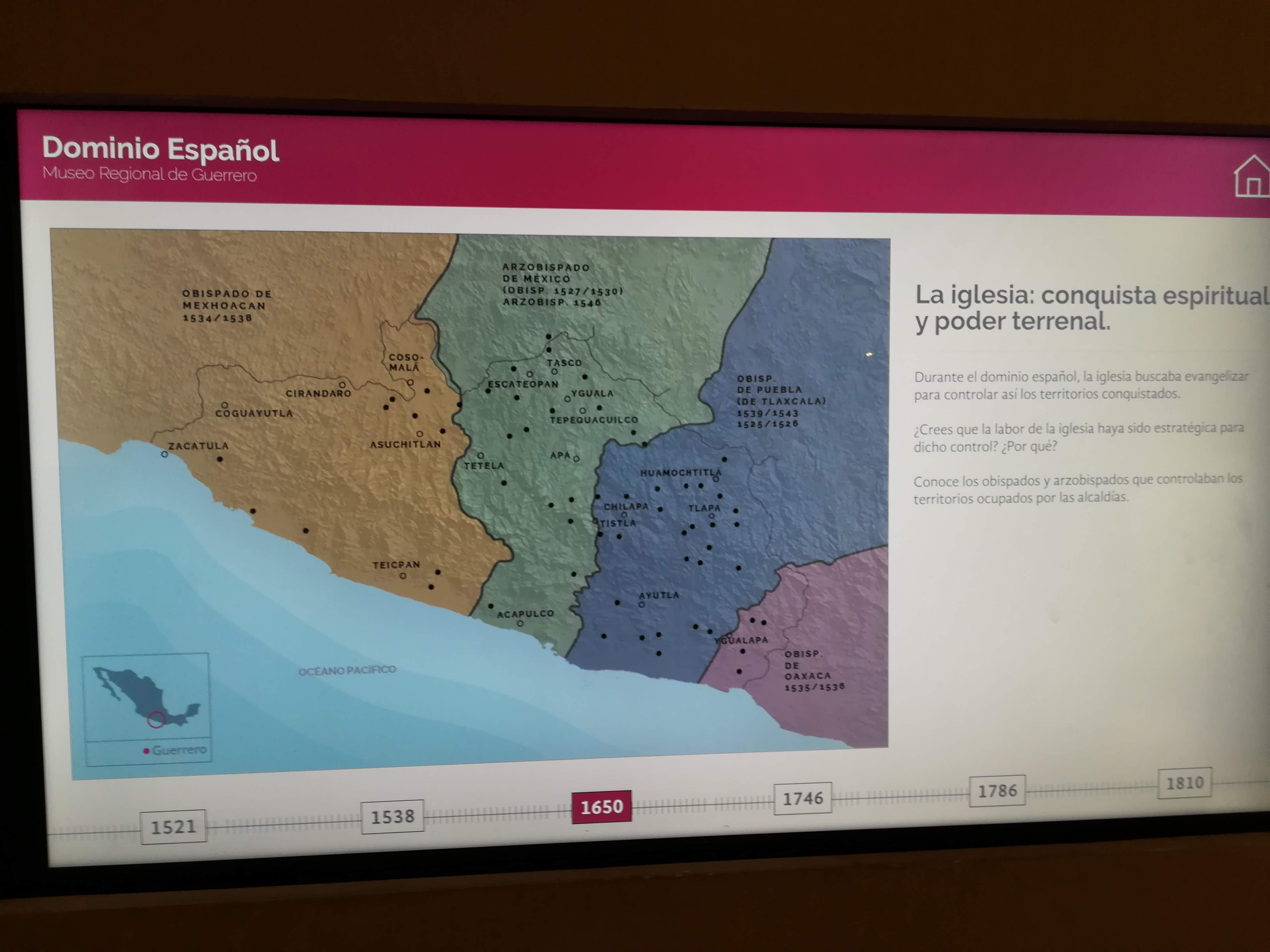 Alcaldías Mayores ubicadas en el actual Estado de Guerrero, que formaron parte del Obispado de Michoacán.